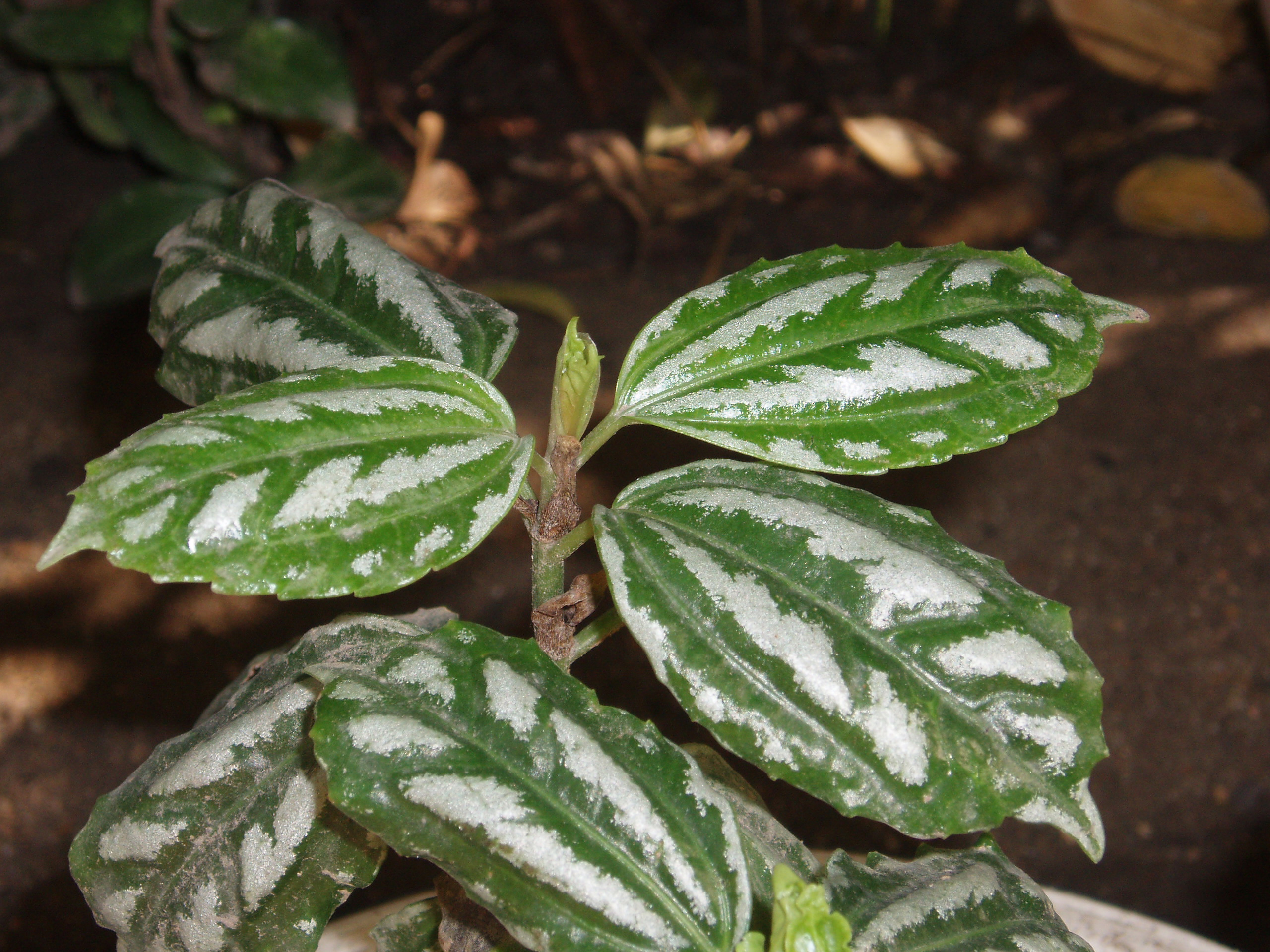 Aluminum plant